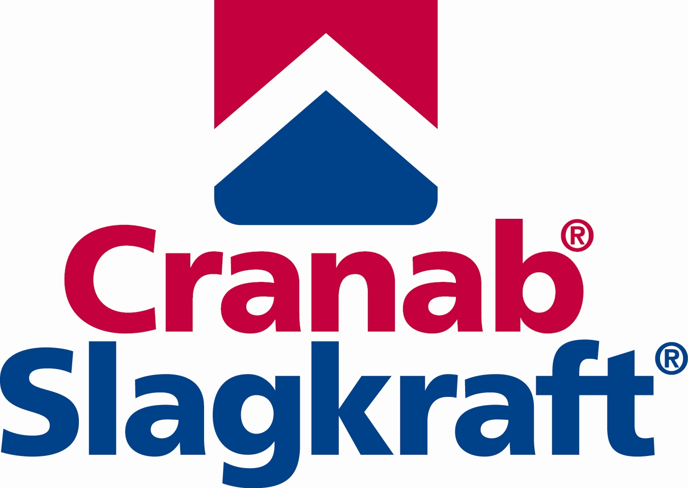 Logotyp Cranab AB